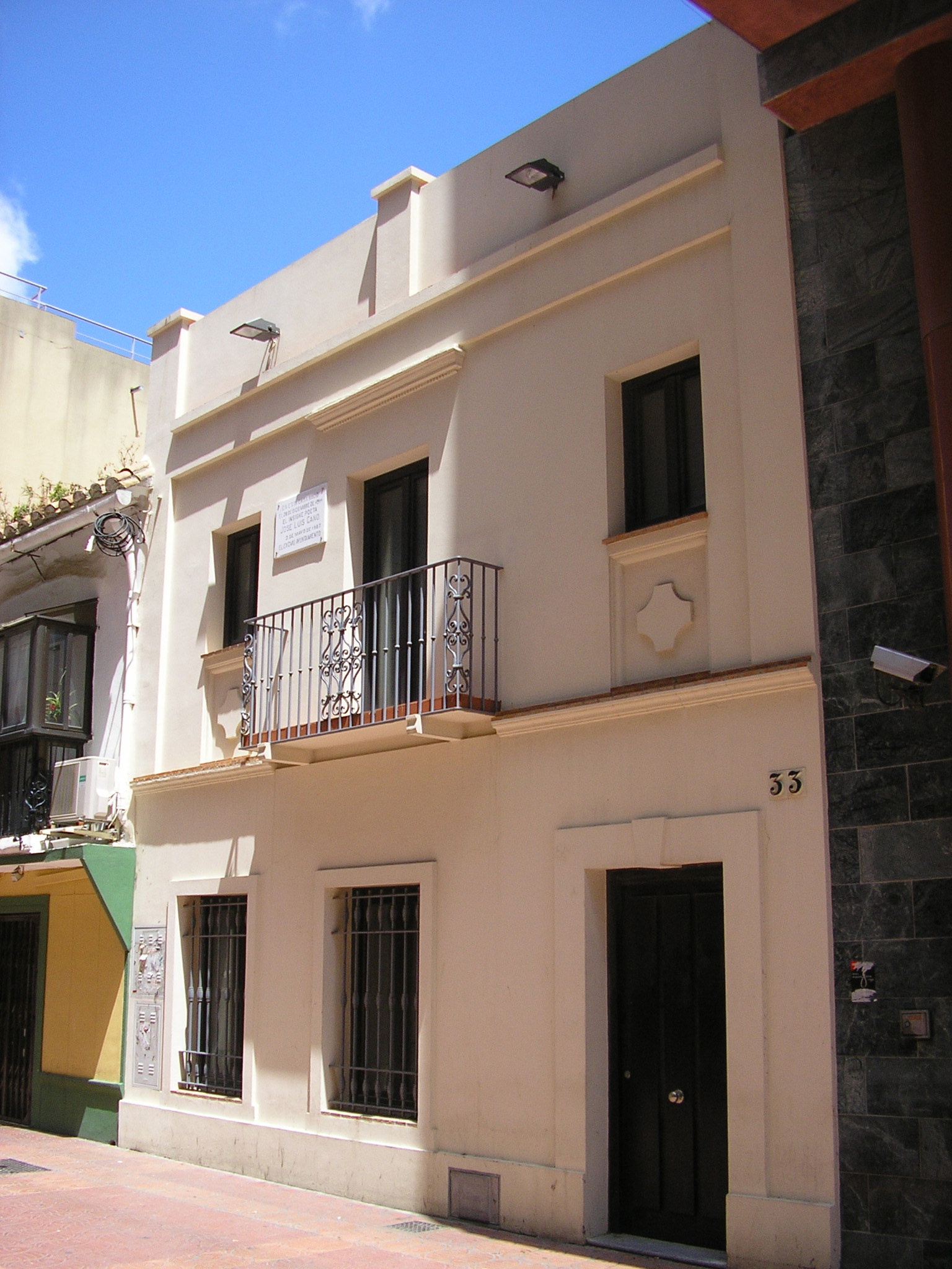 Casa natal de Jose Luis Cano en la localidad andaluza de Algeciras.